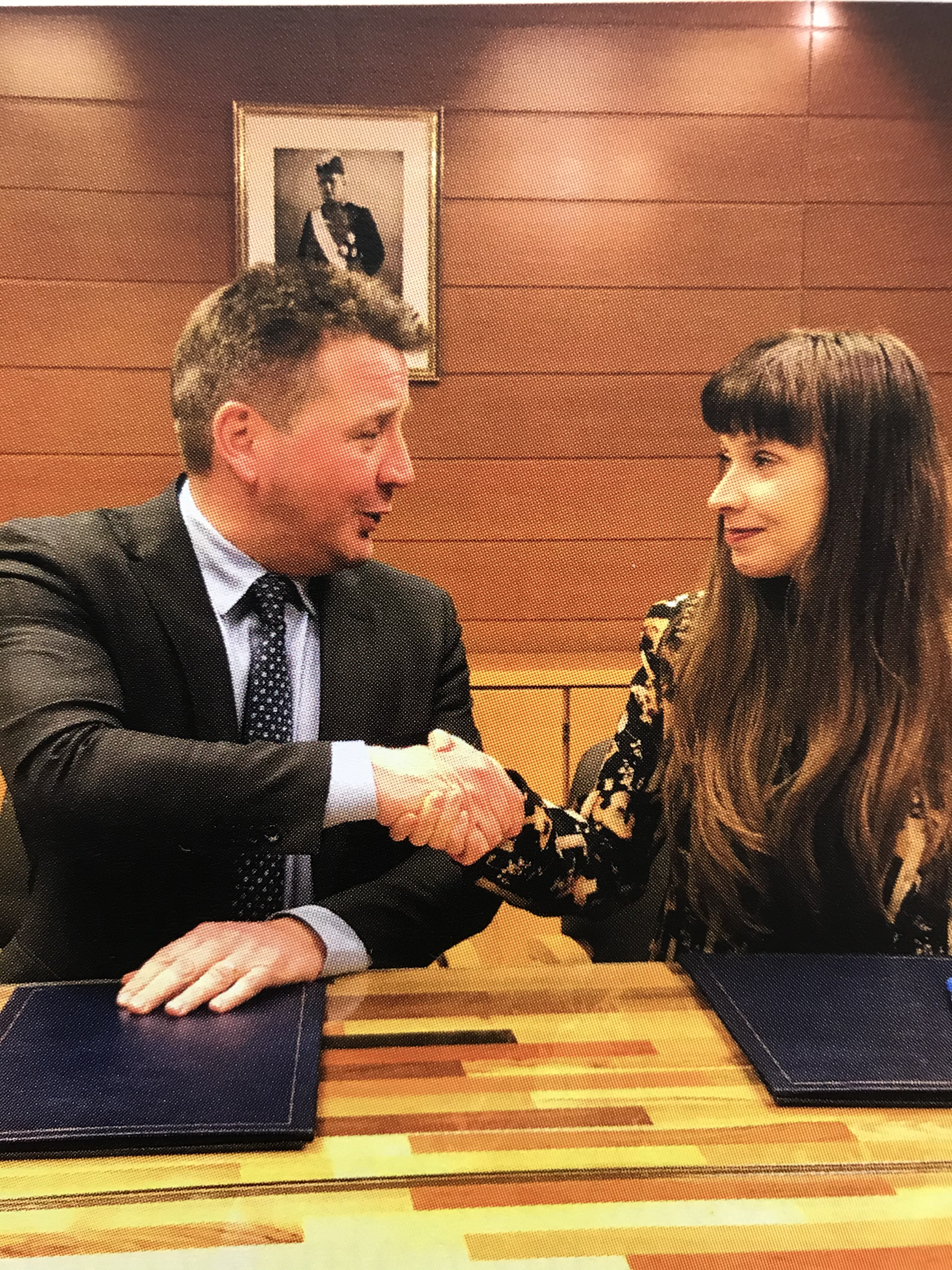 Una Hildardóttir